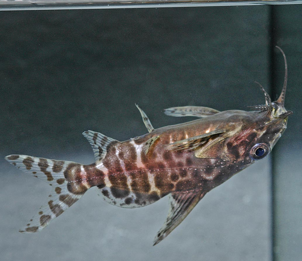 Brachysynodontis batensoda: Jungfisch in Rückenlage